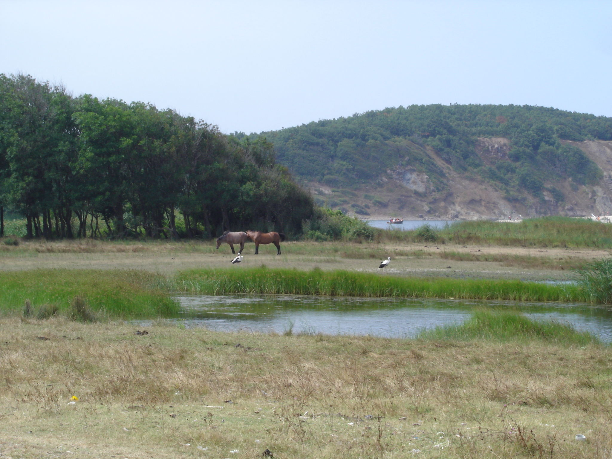 River Veleka, forest reserve in Strandzha, Bulgaria